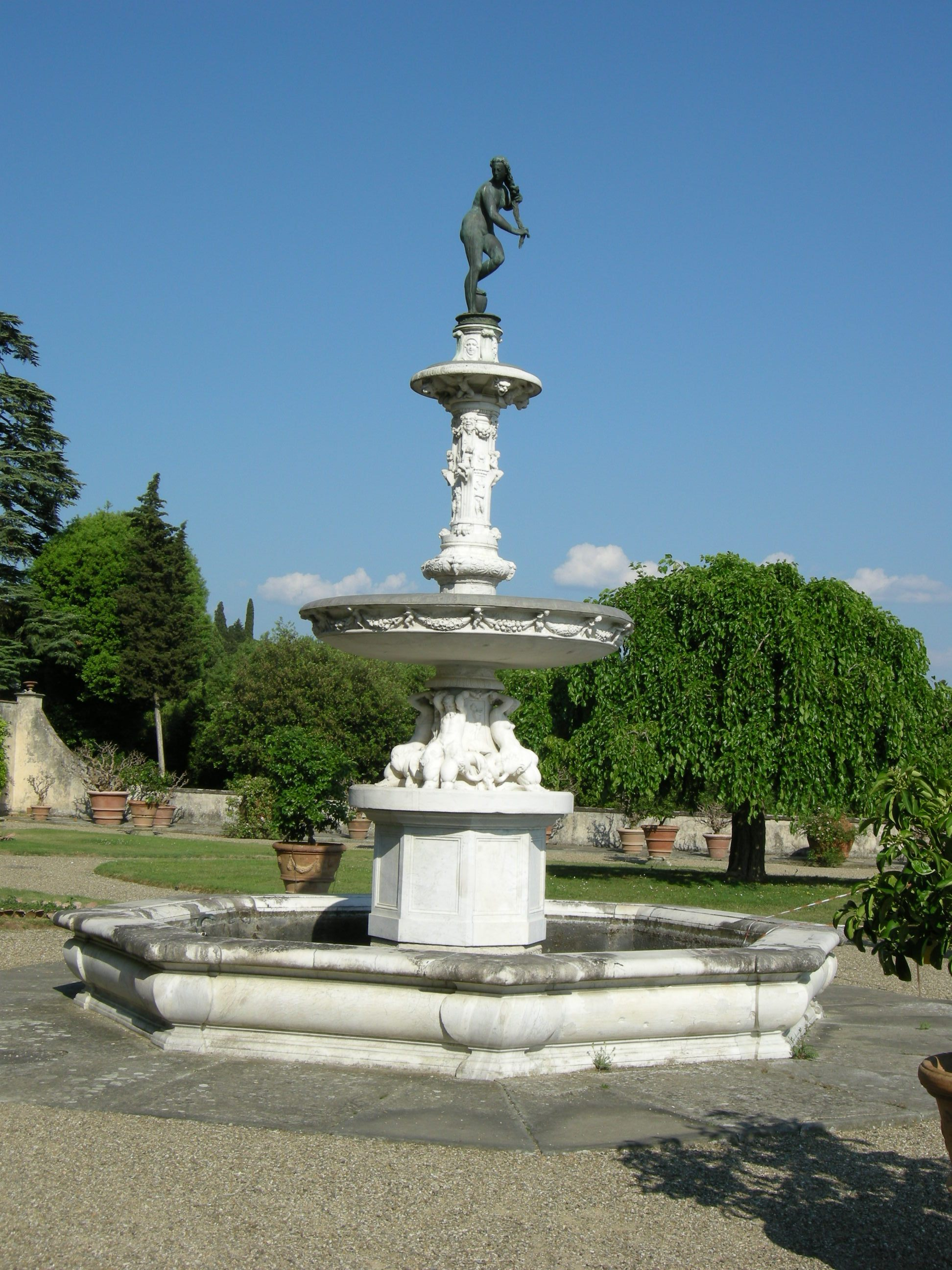 Villa la petraia, fontana